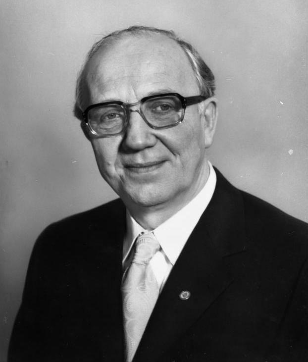 Horst Sindermann ADN-ZB/Hesse 29.10.1976 Horst Sindermann Mitglied des Politbüros des ZK der SED, Präsident der Volkskammer der DDR, Stellvertreter des Vorsitzenden des Staatsrates der DDR. Aufn. Oktober 1973 [Porträt Horst Sindermann] Abgebildete Personen: Sindermann, Horst: Volkskammerpräsident, stellvertretender Staatsratsvorsitzender, DDR